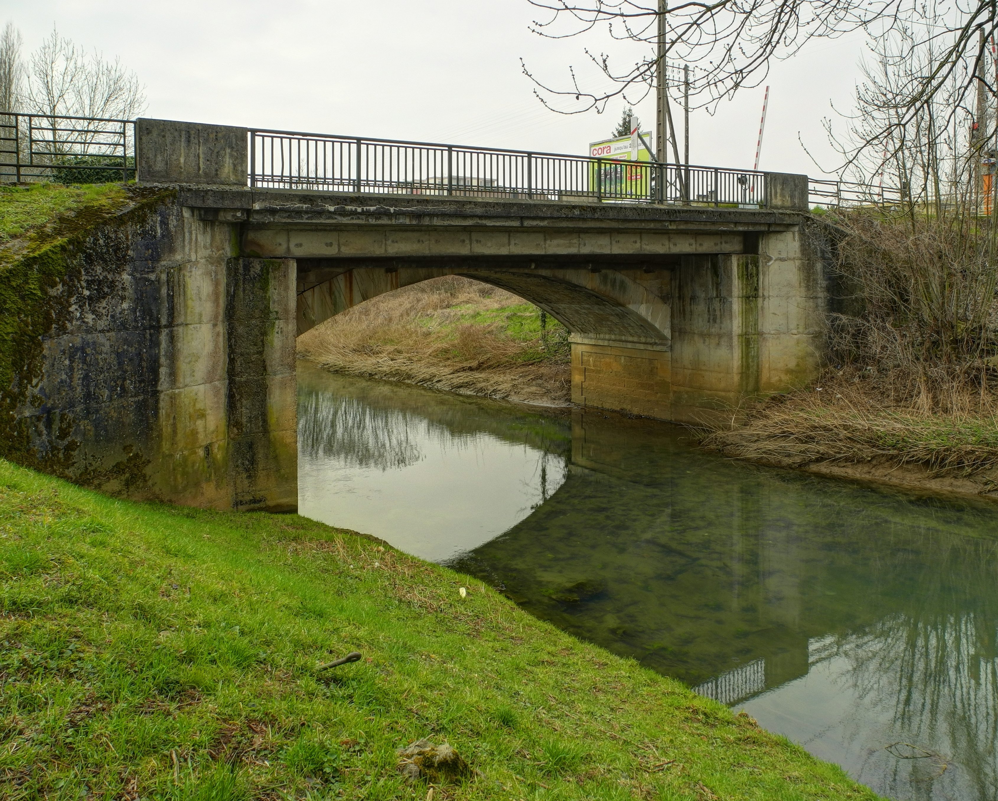 Pont au dessus de la dérivation de la Colombine (HDR).